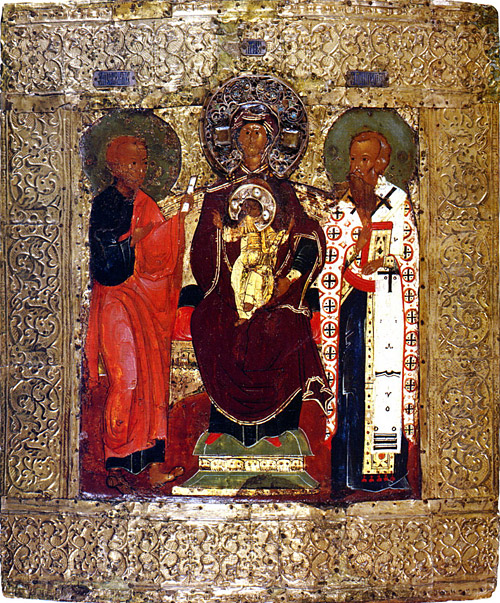 Явление Богоматери с предстоящими апостолом Филиппом и Ипатием Гангрским боярину Захарию Чету. Икона XVI века